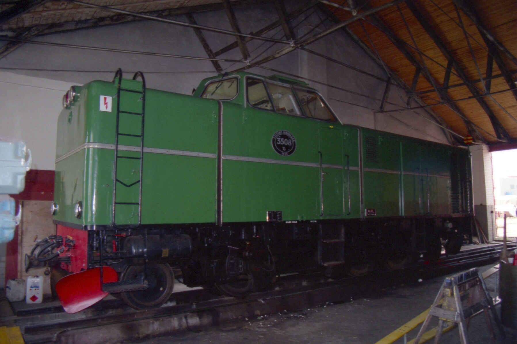 Schmalspurdiesellok Tp 3508 im Lokschuppen von Skara 01.06.00